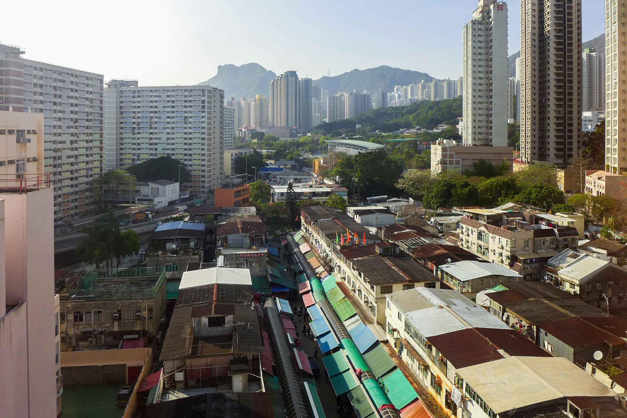 Ngau Chi Wan Tsuen